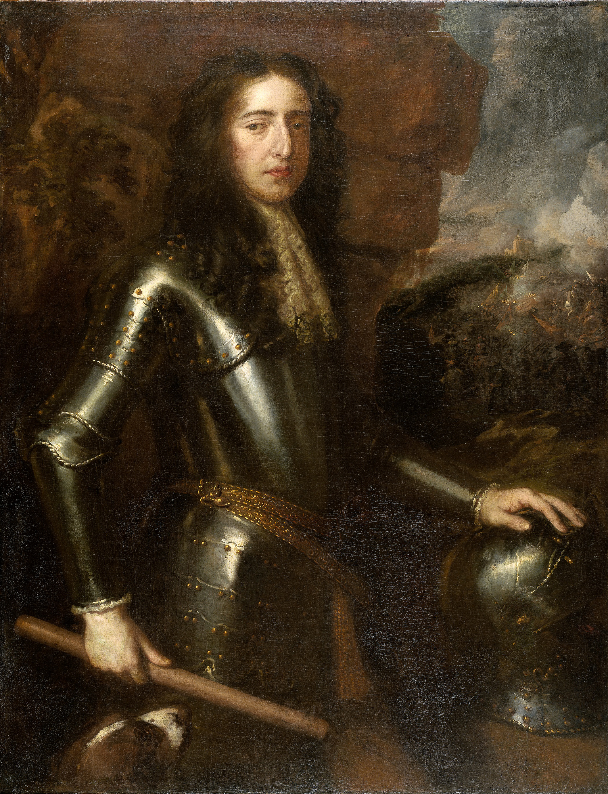 Portret van Willem III, prins van Oranje, stadhouder en sedert 1689 tevens koning van Engeland. Heupstuk, staande in wapenrusting naar rechts met commandostaf in de rechterhand, de linkerhand rustend op een helm. Onderaan de kop van een hond. Op de achtergrond een veldslag. Hoogstwaarschijnlijk gebaseerd op een prototype van Sir Peter Lely.